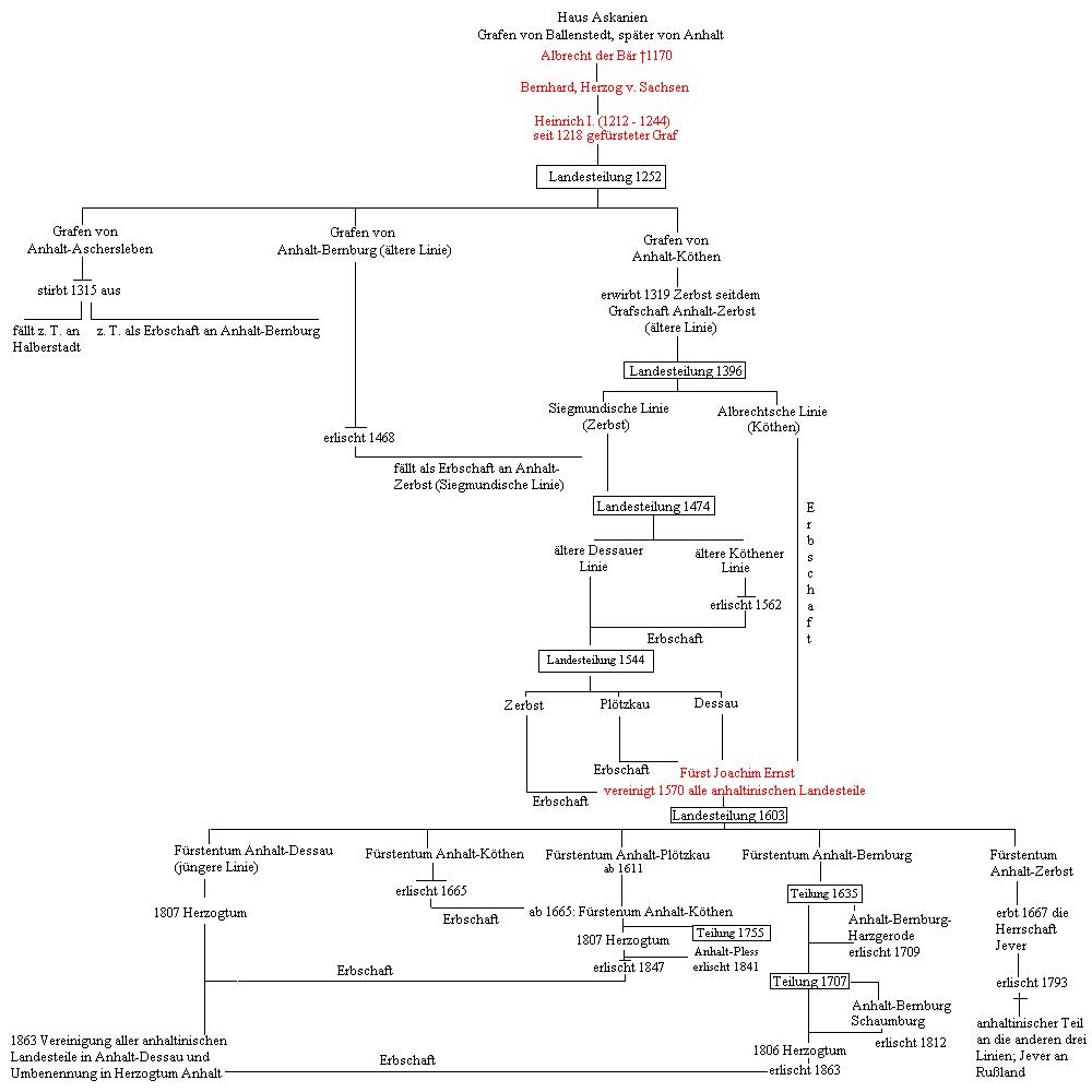 Schema Anhaltinische Landesteilungen